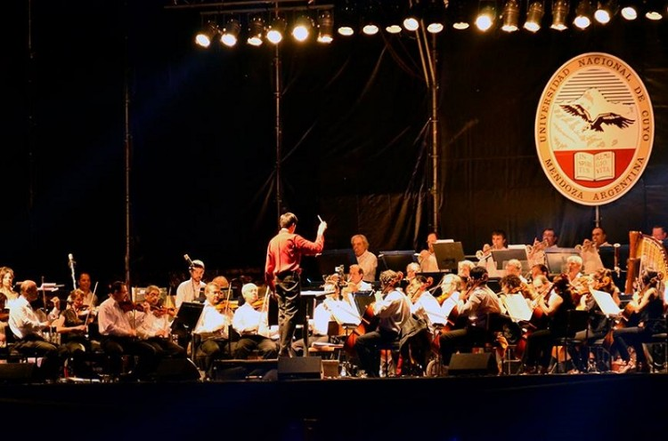 Orquesta Sinfónica de la UNCuyo